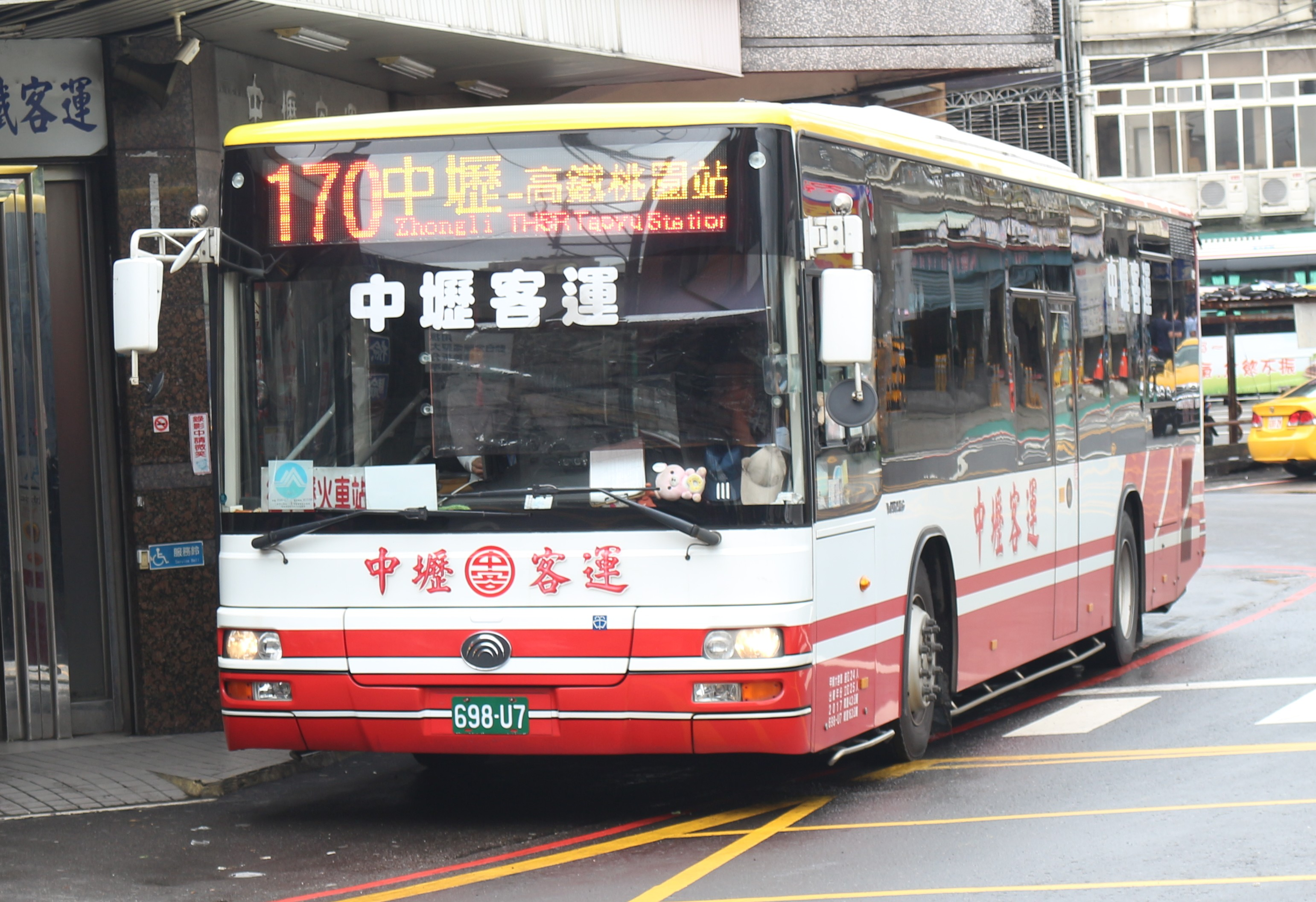 中壢客運 2017 Yutong ZK6128HG 698-U7 170 一般市區用塗裝